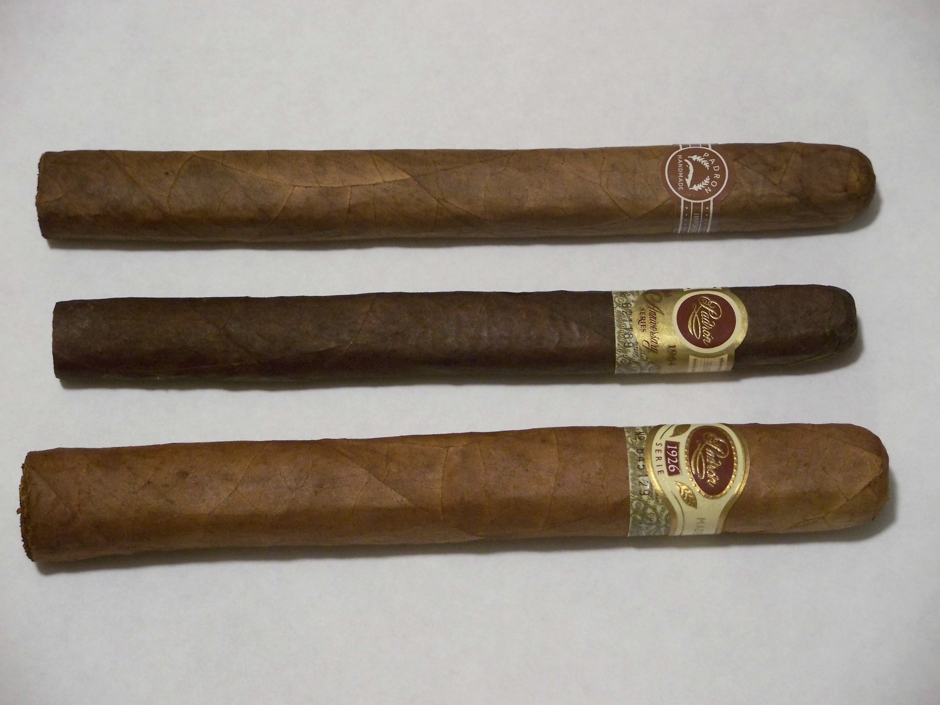 From top to bottom: a regular Padrón cigar; a Padrón Anniversary Series cigar; a Padrón 1926 Serie cigar.